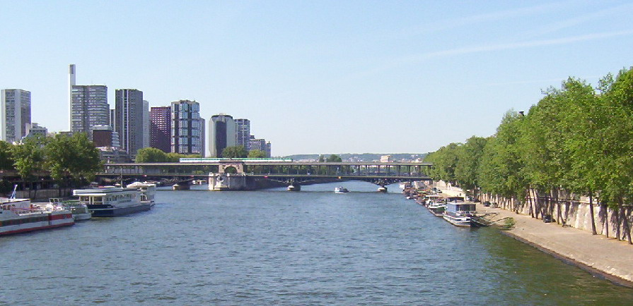 Summary Photo prise depuis le pont d'Iena par moi-meme en mai 2003